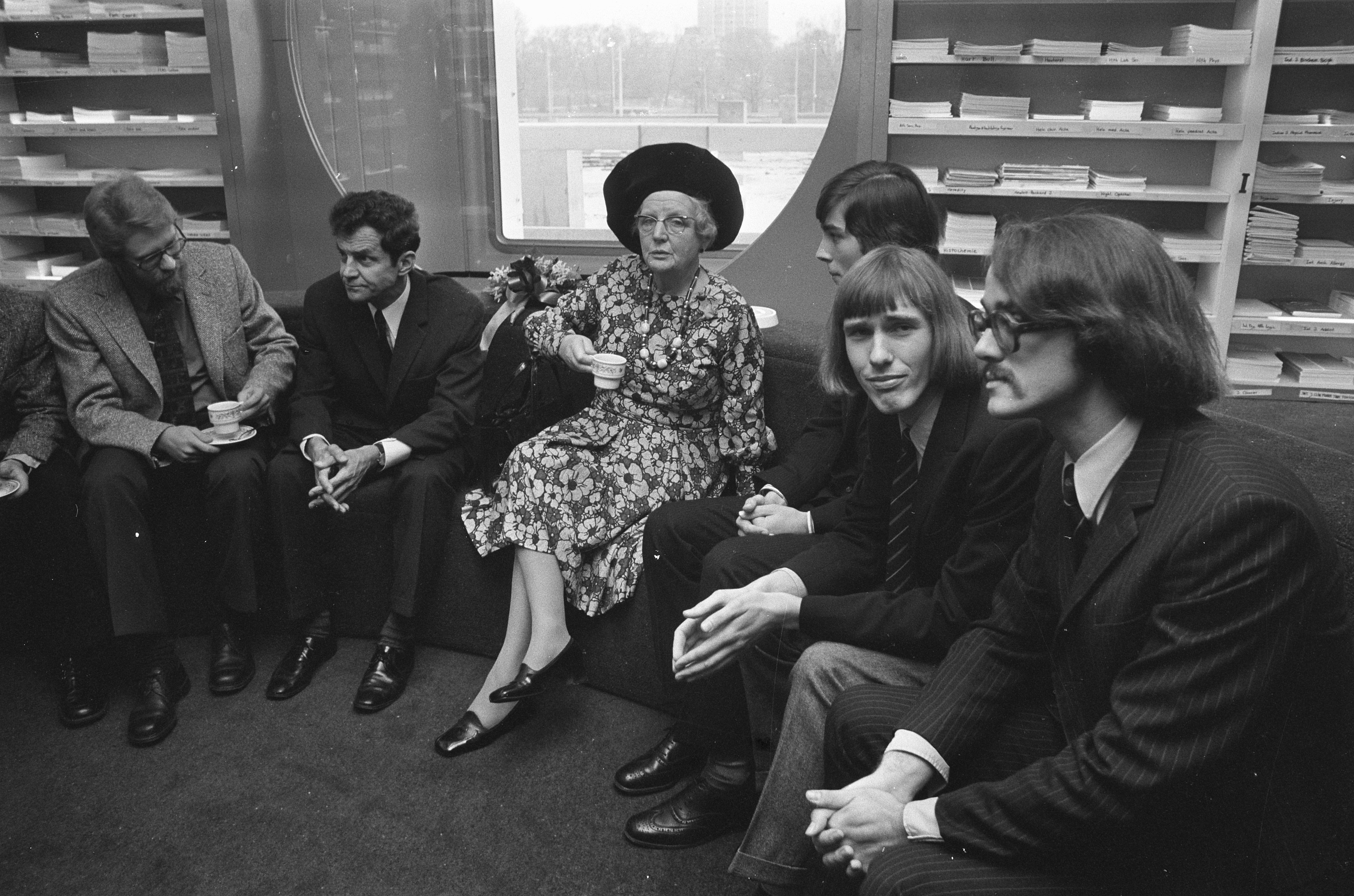 Collectie / Archief : Fotocollectie Anefo Reportage / Serie : Koningin Juliana opent de Erasmus Universiteit te Rotterdam Beschrijving : De koningin spreekt met studenten Datum : 8 november 1973 Locatie : Rotterdam, Zuid-Holland Trefwoorden : koninginnen, openingen, studenten Persoonsnaam : Juliana, koningin Fotograaf : Bert Verhoeff / Anefo Auteursrechthebbende : Nationaal Archief Materiaalsoort : Negatief (zwart/wit) Nummer archiefinventaris : bekijk toegang 2.24.01.05 Bestanddeelnummer : 926-8124